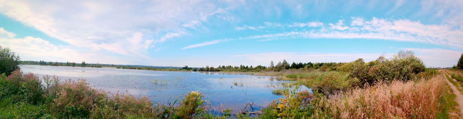 Бярэзінскія разьлівы. Biarezina river overflows